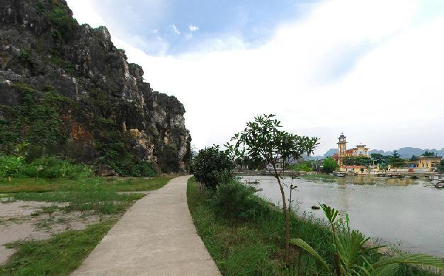 Đường vào suối nóng Kênh Gà - Gia Viễn - Ninh Bình. Ảnh chụp để đưa vào các bài viết liên quan.